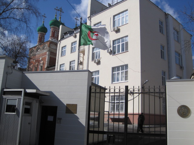 Chancellerie de la République Algérienne Démocratique et Populaire à Moscou